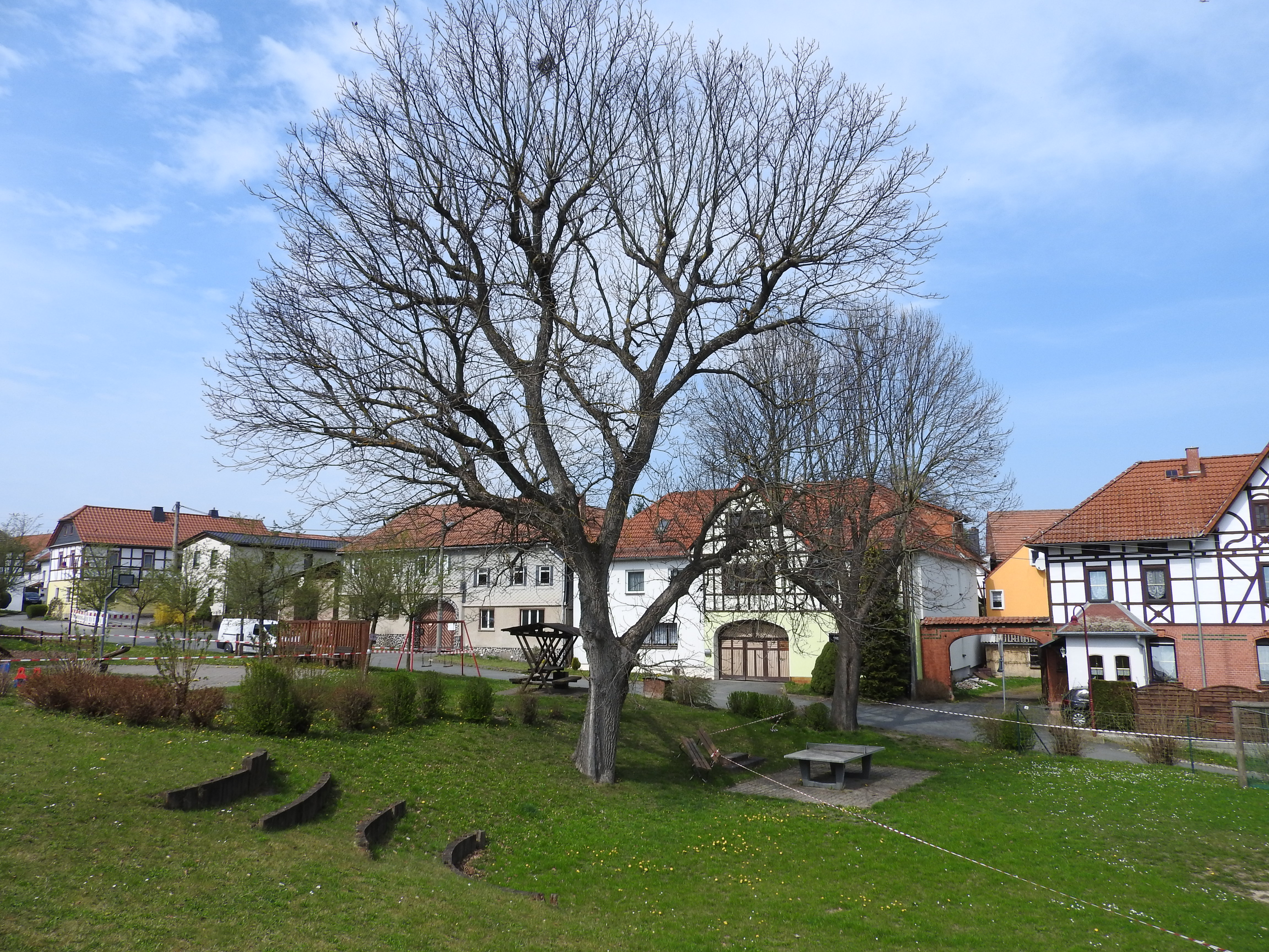 Paska in Thüringen